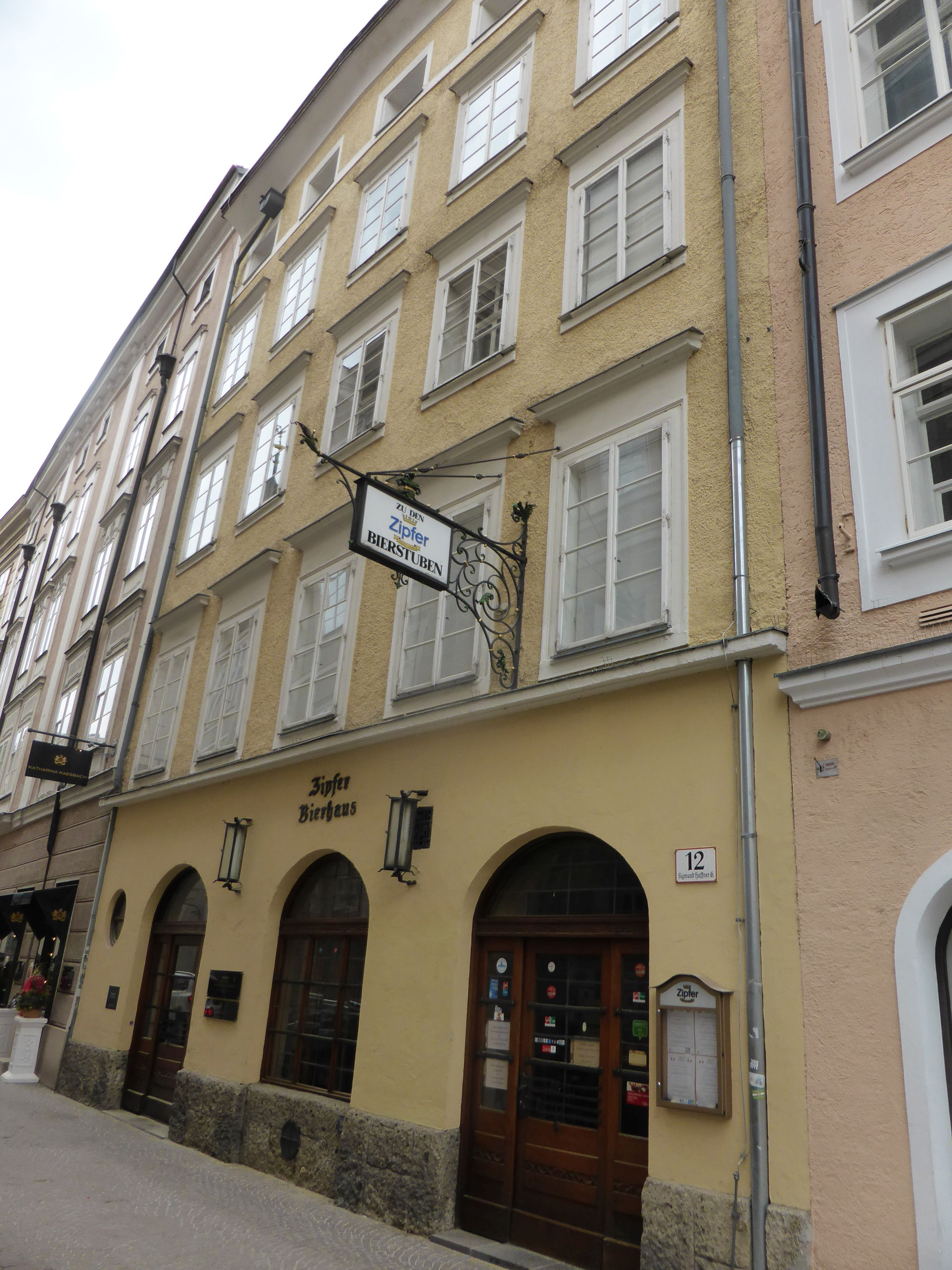 Sigmund-Haffner-Gasse 14